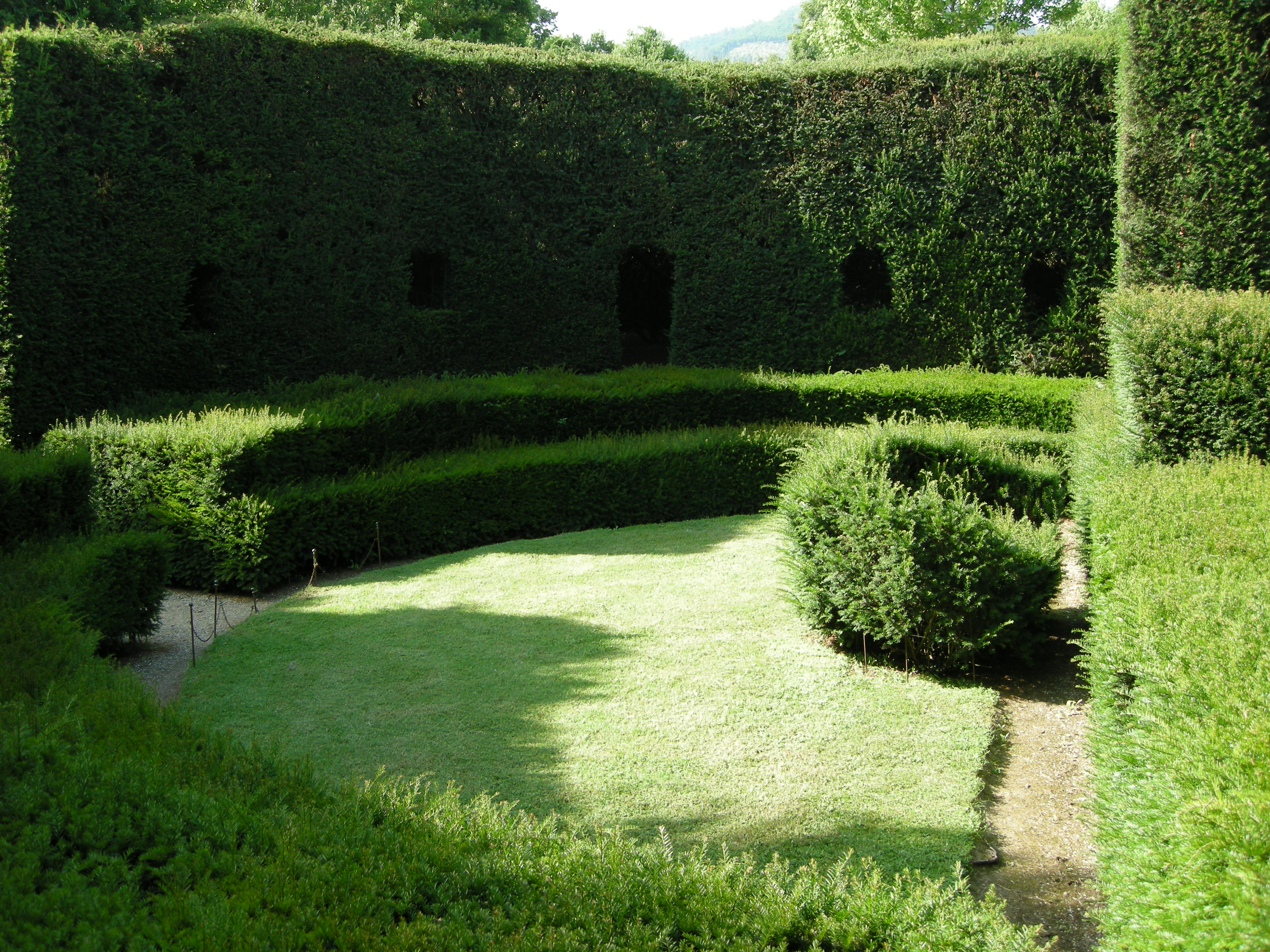 Villa reale di marlia, teatro di verzura 06 platea